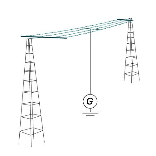 Antenne, elektrisch verlängert mittels Dachkapazität (blau). "T-Antenne". Schemazeichnung. (G: Generator für Sendespannung; Symbol für Erde.)